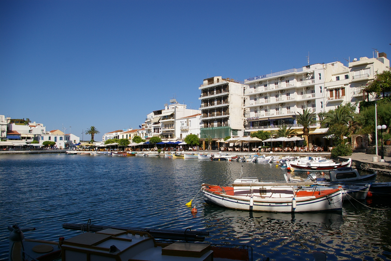 Lake Voulismeni in Agios Nikolaos